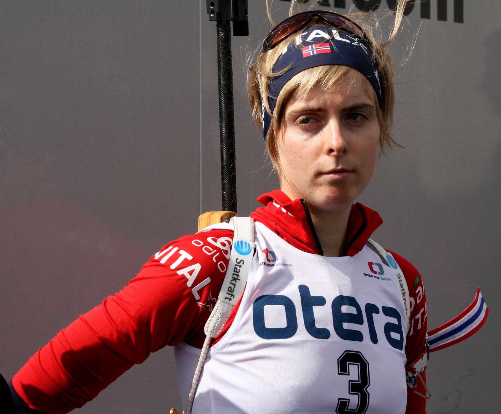 Julie Bonnevie-Svendsen under Blinkfestivalen i Sandnes 2009